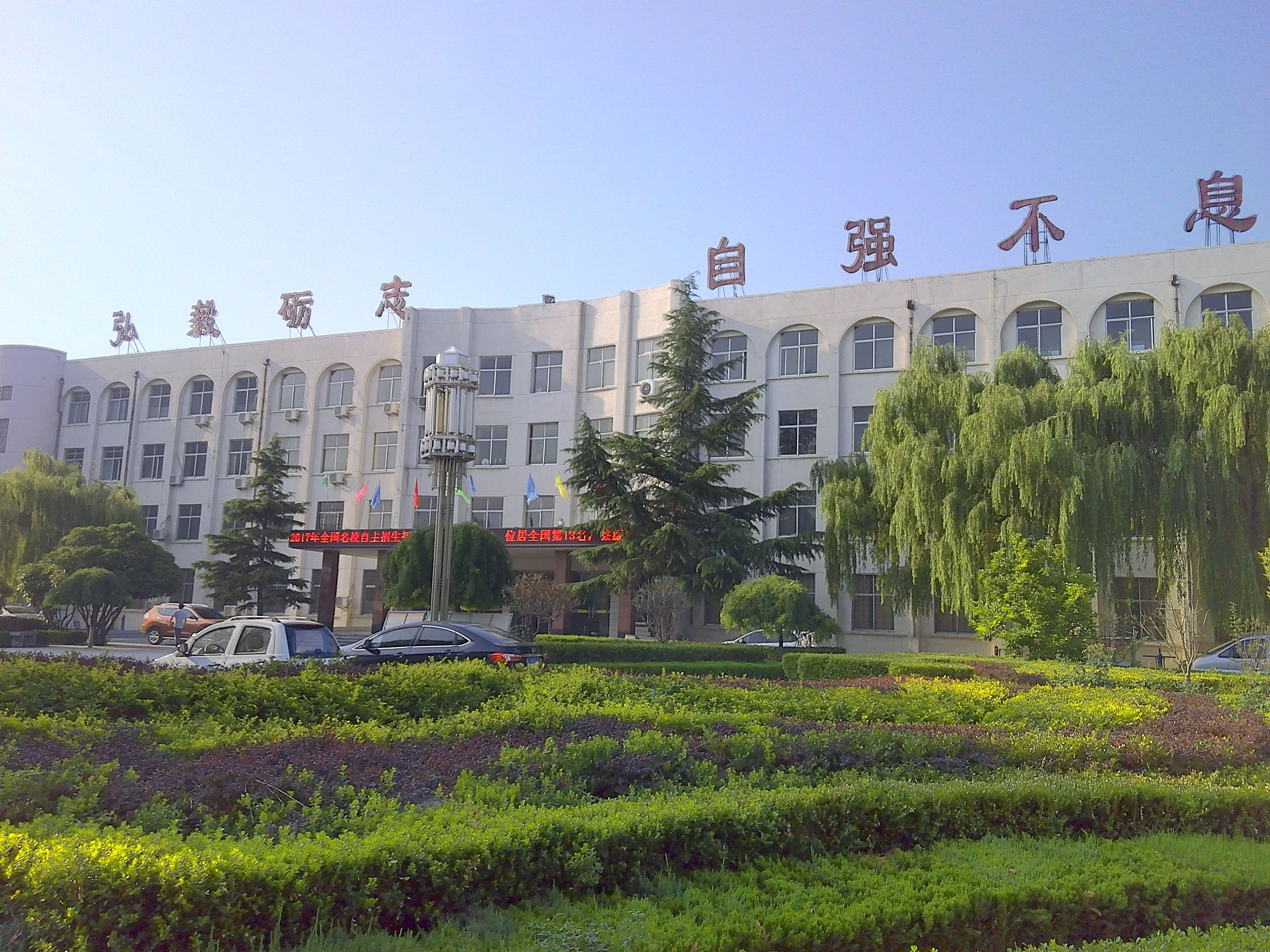 中文（中国大陆）: 东平高级中学，摄于2017年夏季高中学业水平测试期间